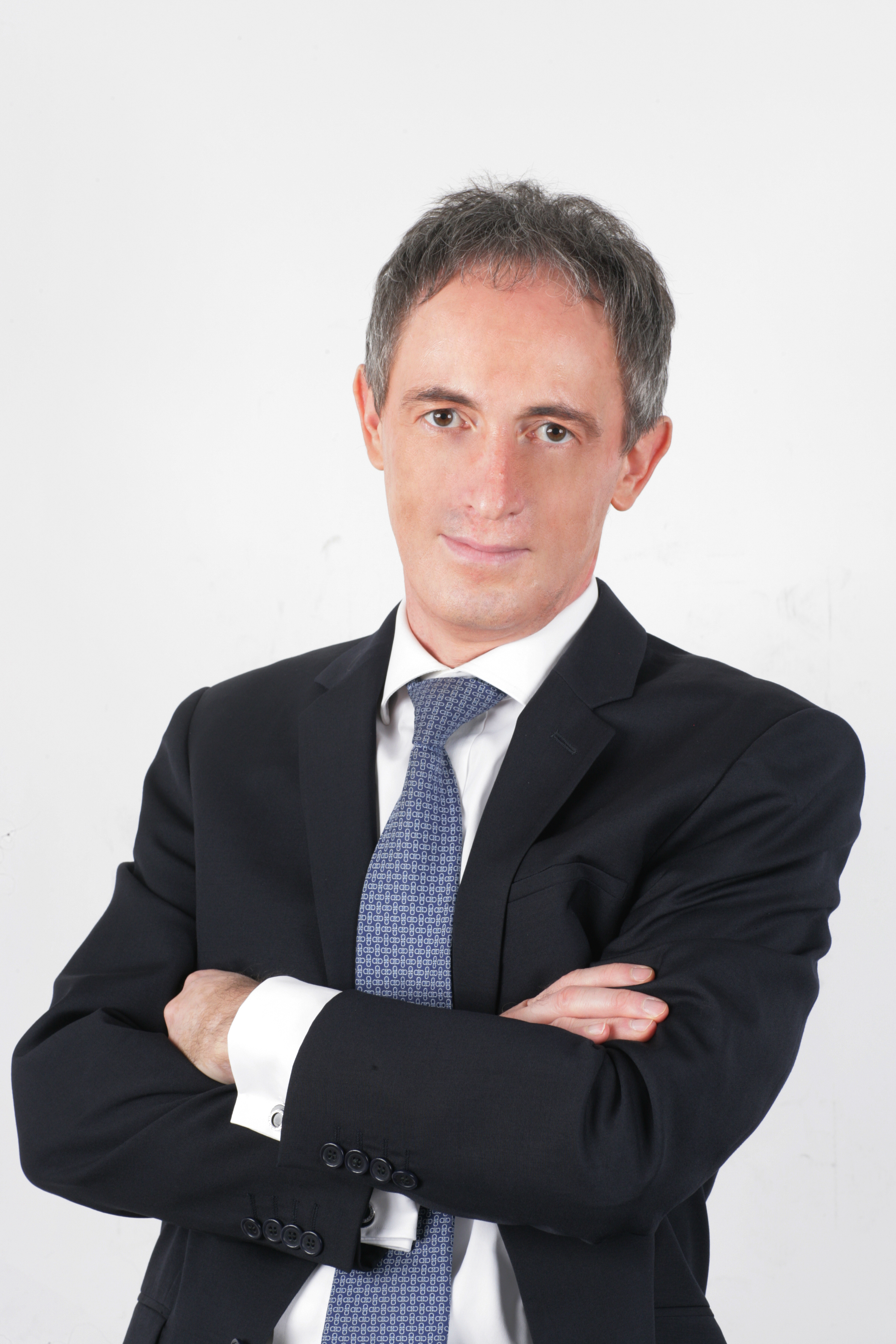 Dirigente d'azienda trentino